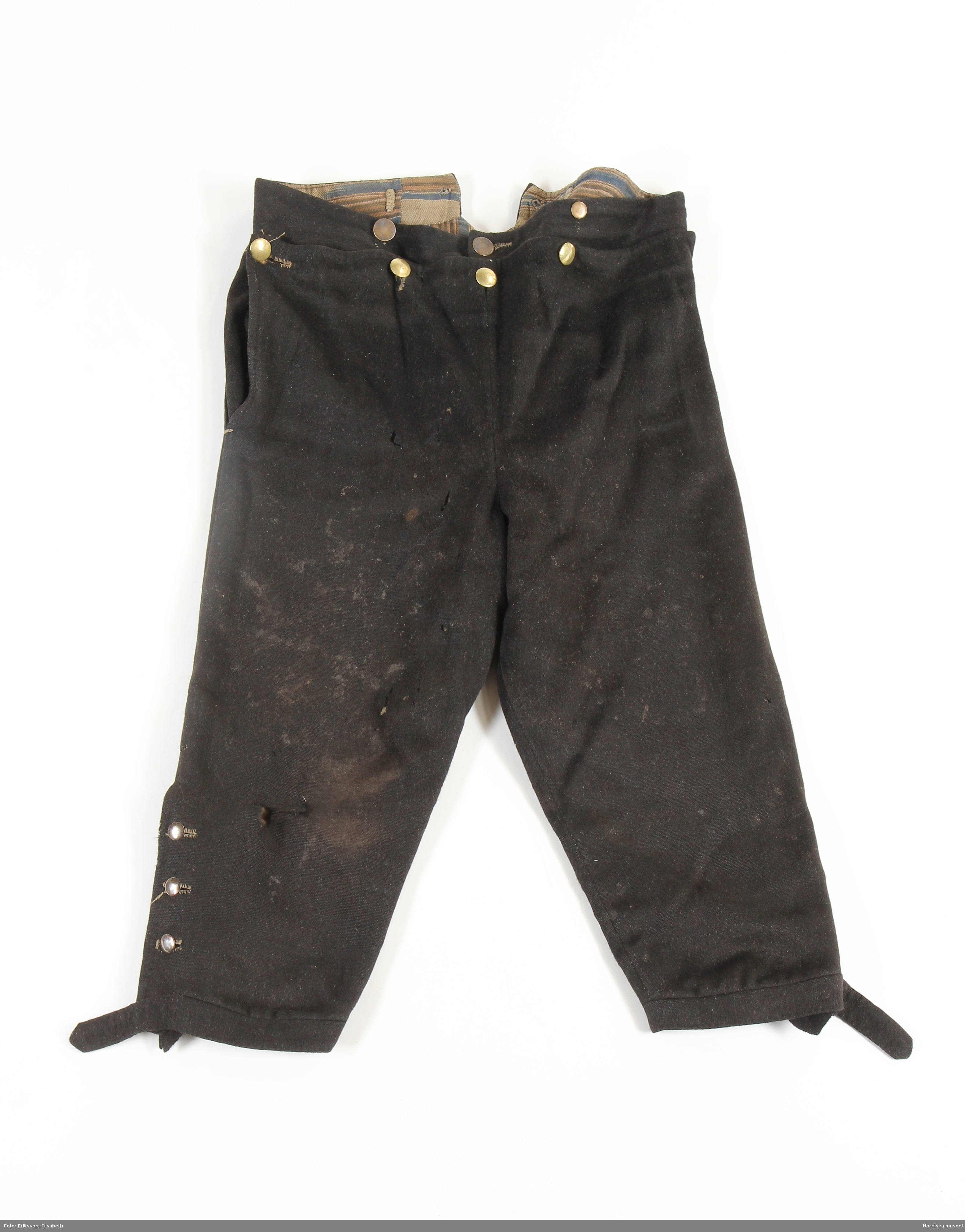 Byxor